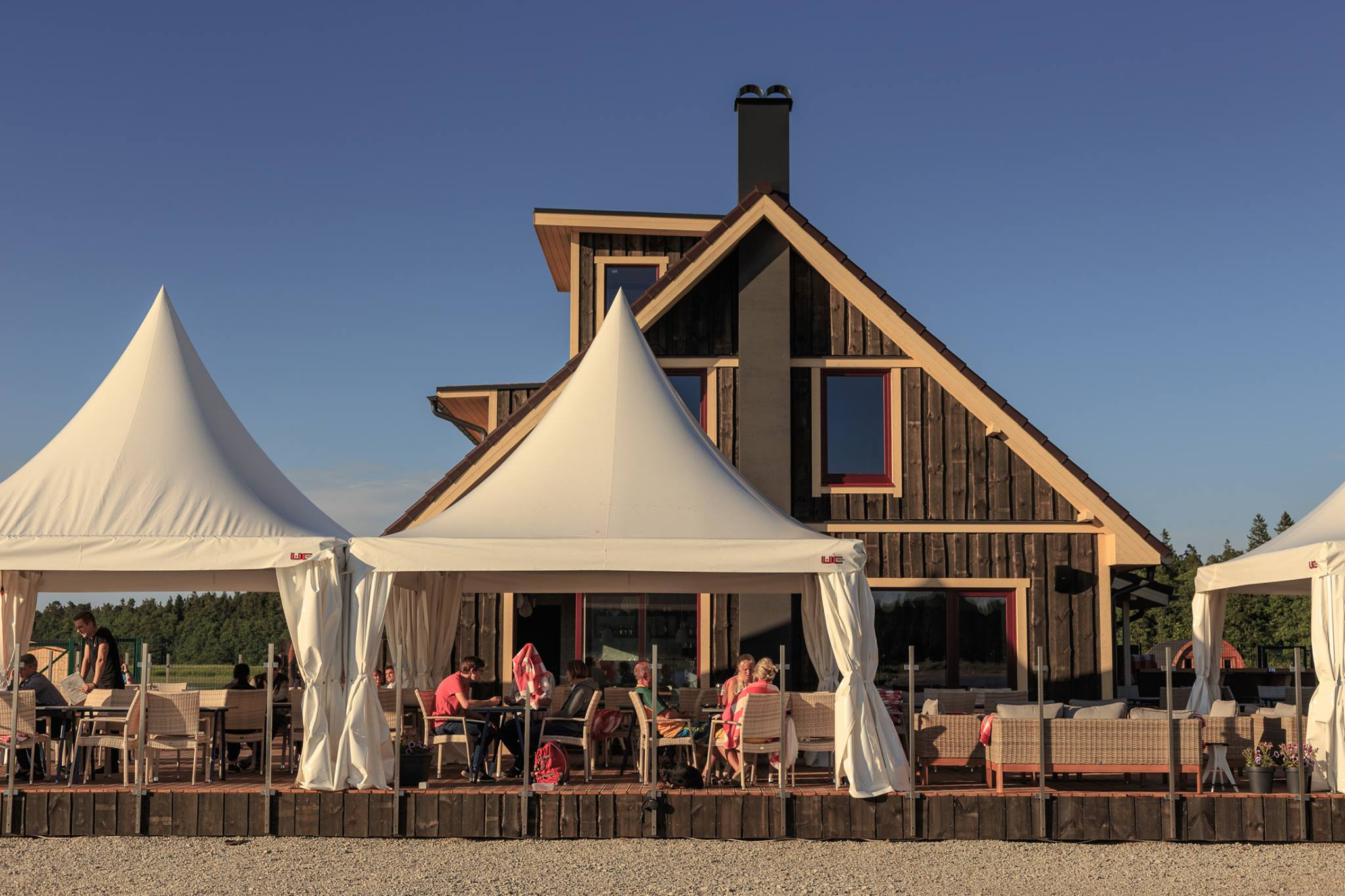 Võsu sadamas asuv restoran